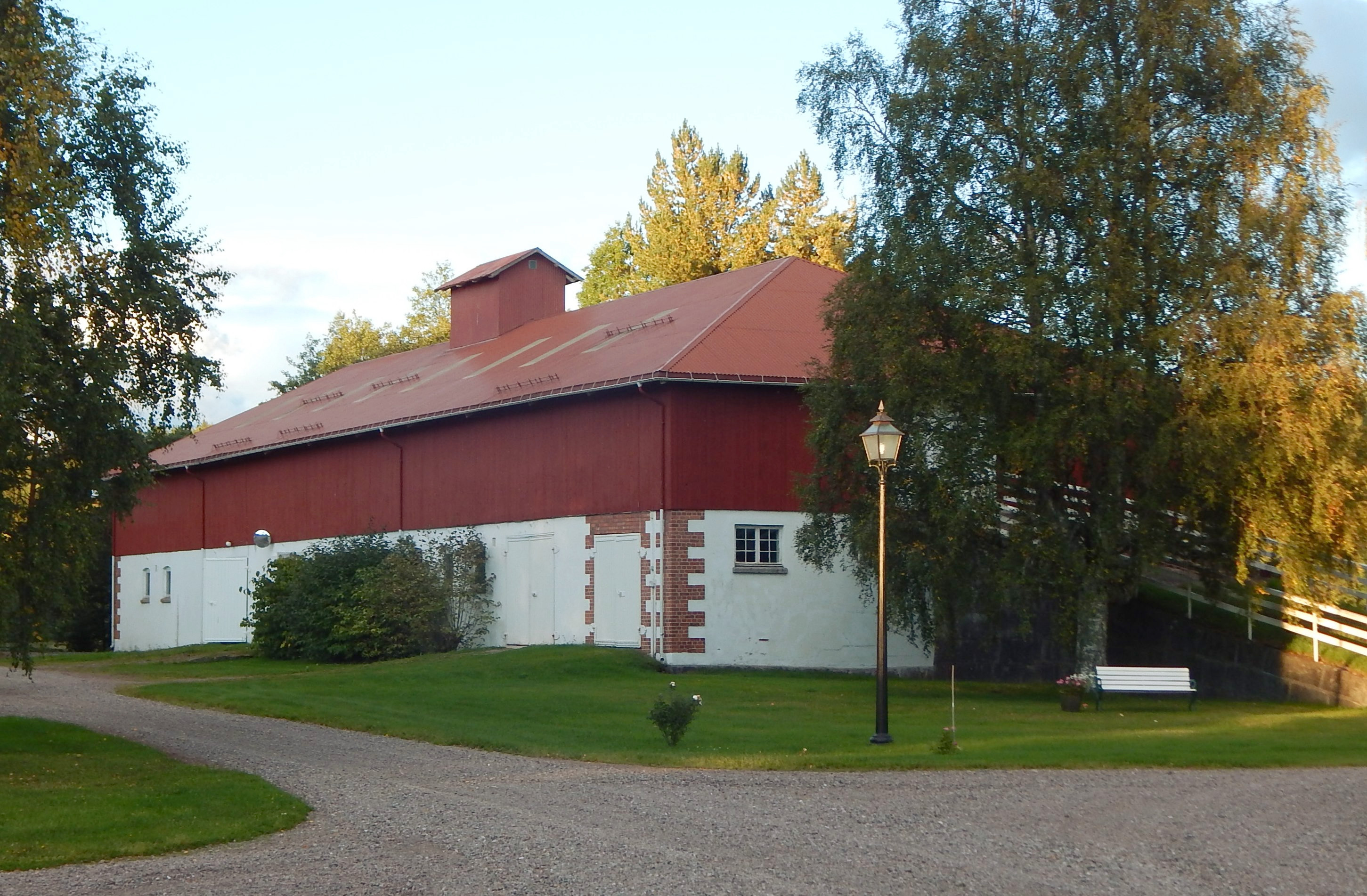 x-default